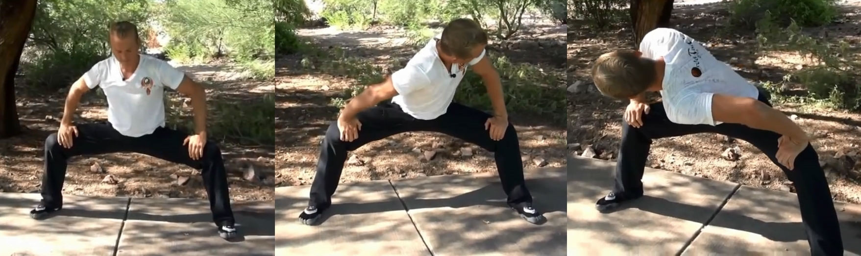 memutar badan dan pinggul